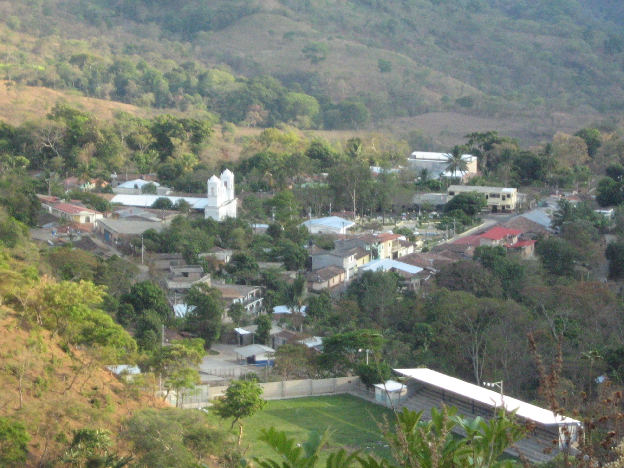 Vistazo del Casco Urbano C. Victoria